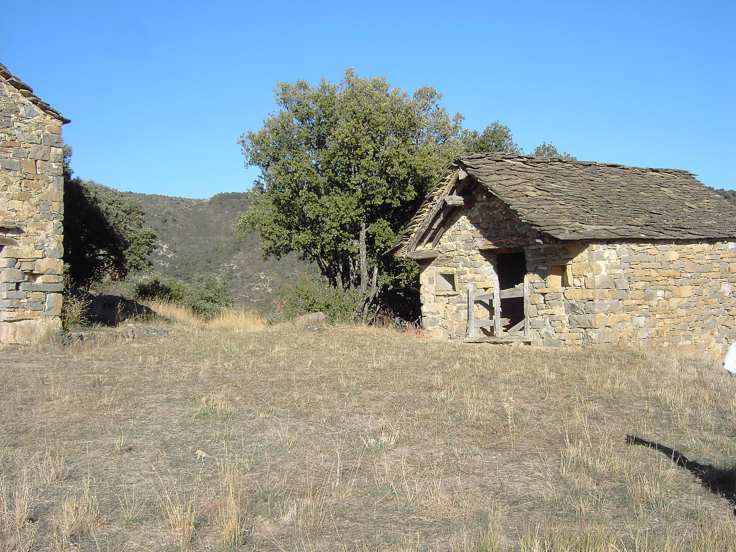 Aragonés: Una era de trilla en Ascaso, con sus bordas circundantes.